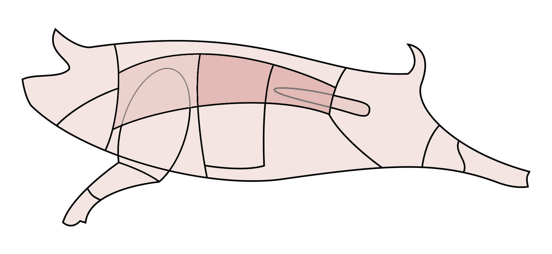 Schematische Darstellung eines Schweins, Rippenstück.